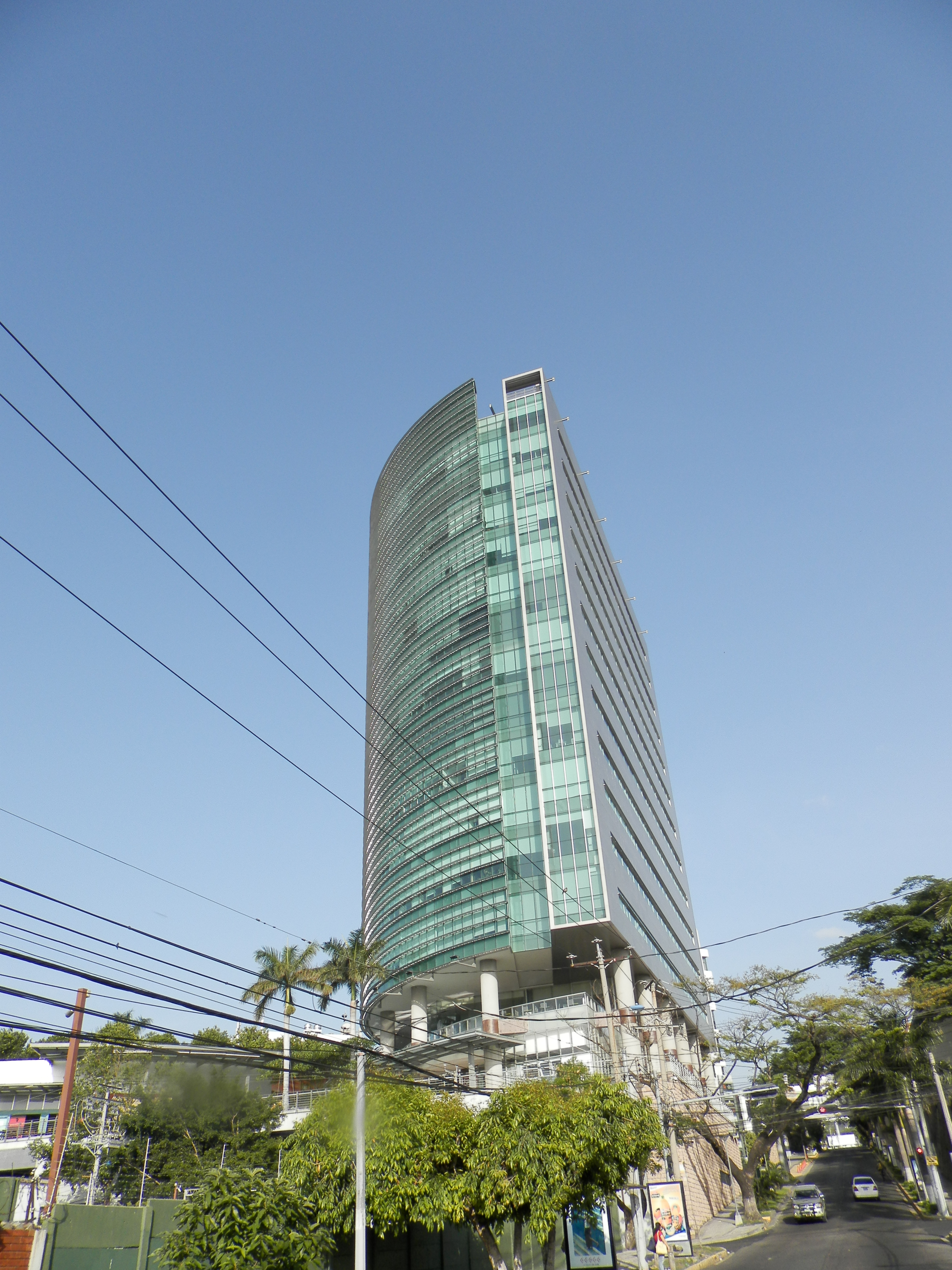 Torre Futura de perfil